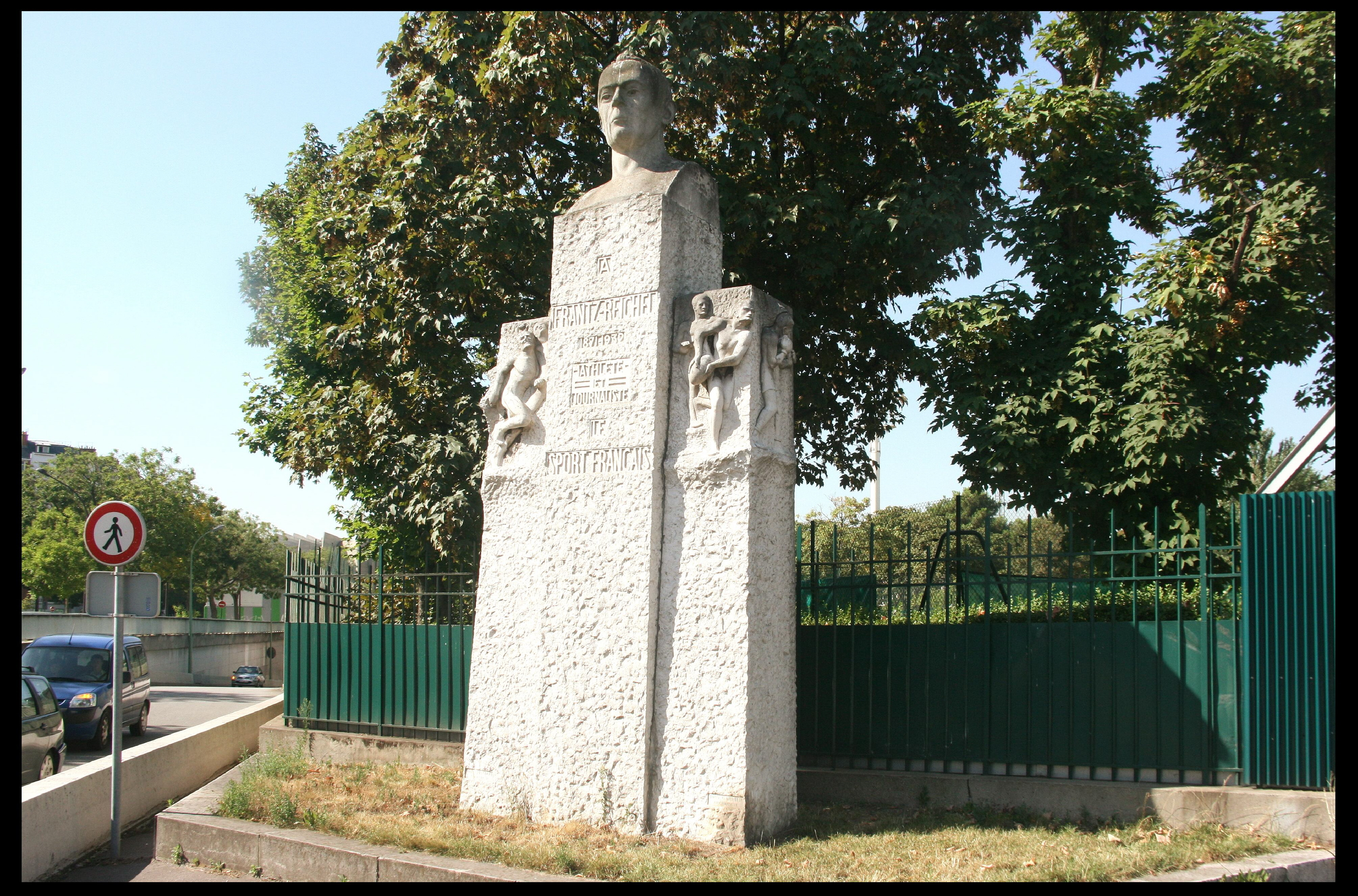 Alexandre Maspoli (français, 1875-1943) et Tony Garnier (français, 1869-1948): Monument à Frantz Reichel, 1934, Avenue du Général-Sarrail, XVIe arrondissement, Paris, France.